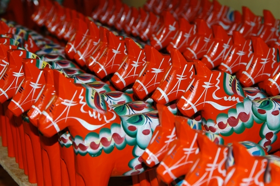 Fertiggestellte Pferdchen warten in Reih und Glied auf die Käufer